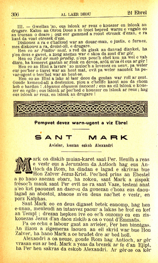 Abad Perrot. Baz-306